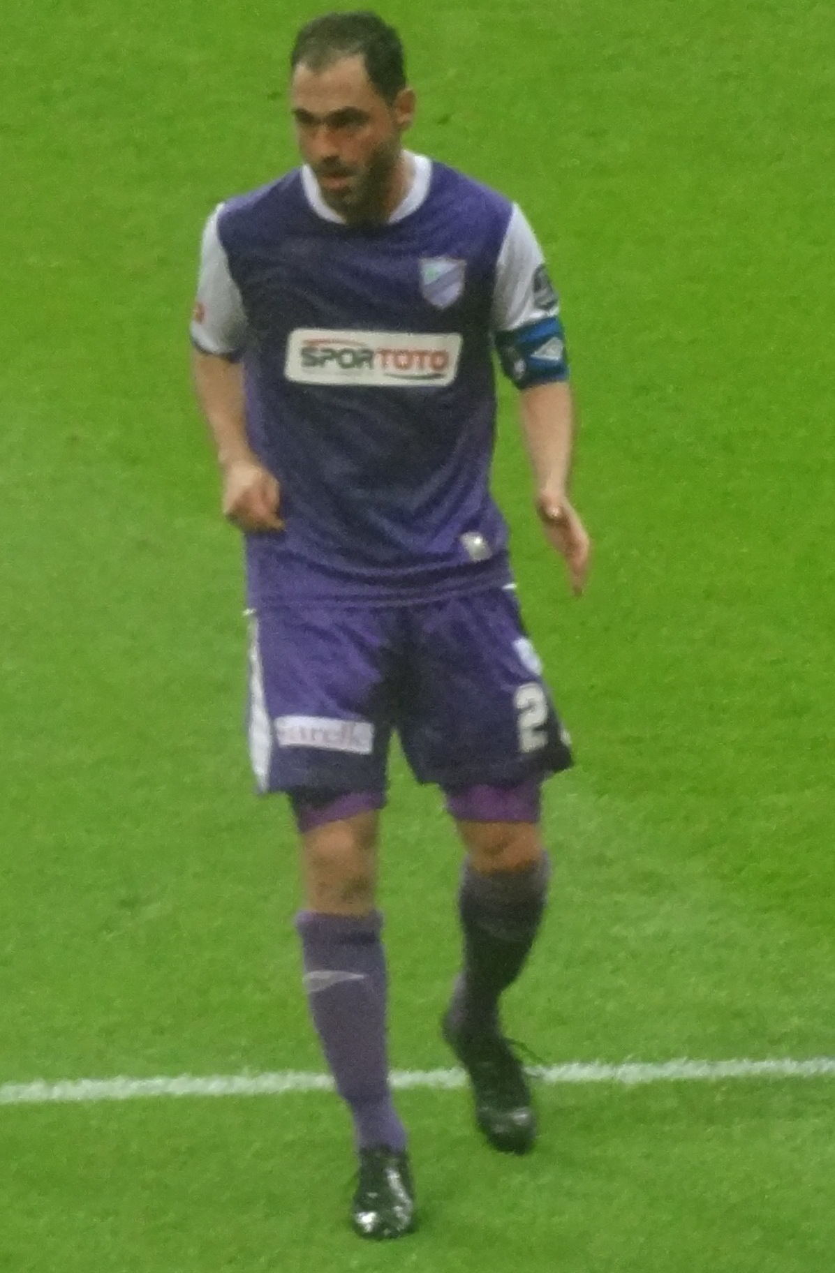 S.Şahin GS karşısında